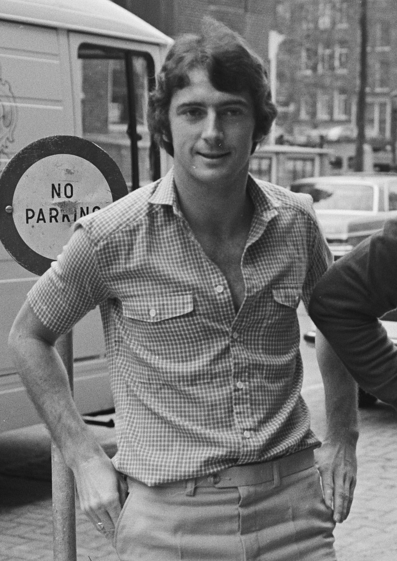 Amsterdam, 22 aprile 1980. Il calciatore del Nottingham Forest FC, Trevor Francis, alla vigilia della semifinale di ritorno della Coppa dei Campioni 1979-80 contro l'AFC Ajax.